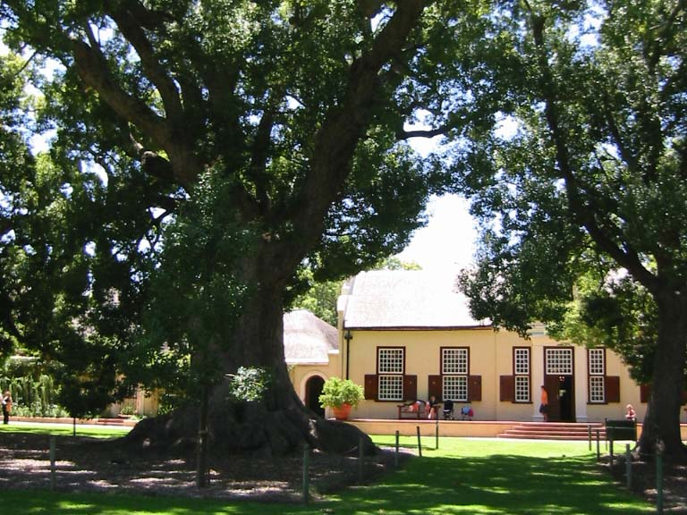 Weingut Vergelegen (Südafrika) mit 300 Jahre alten Kamferbäumen